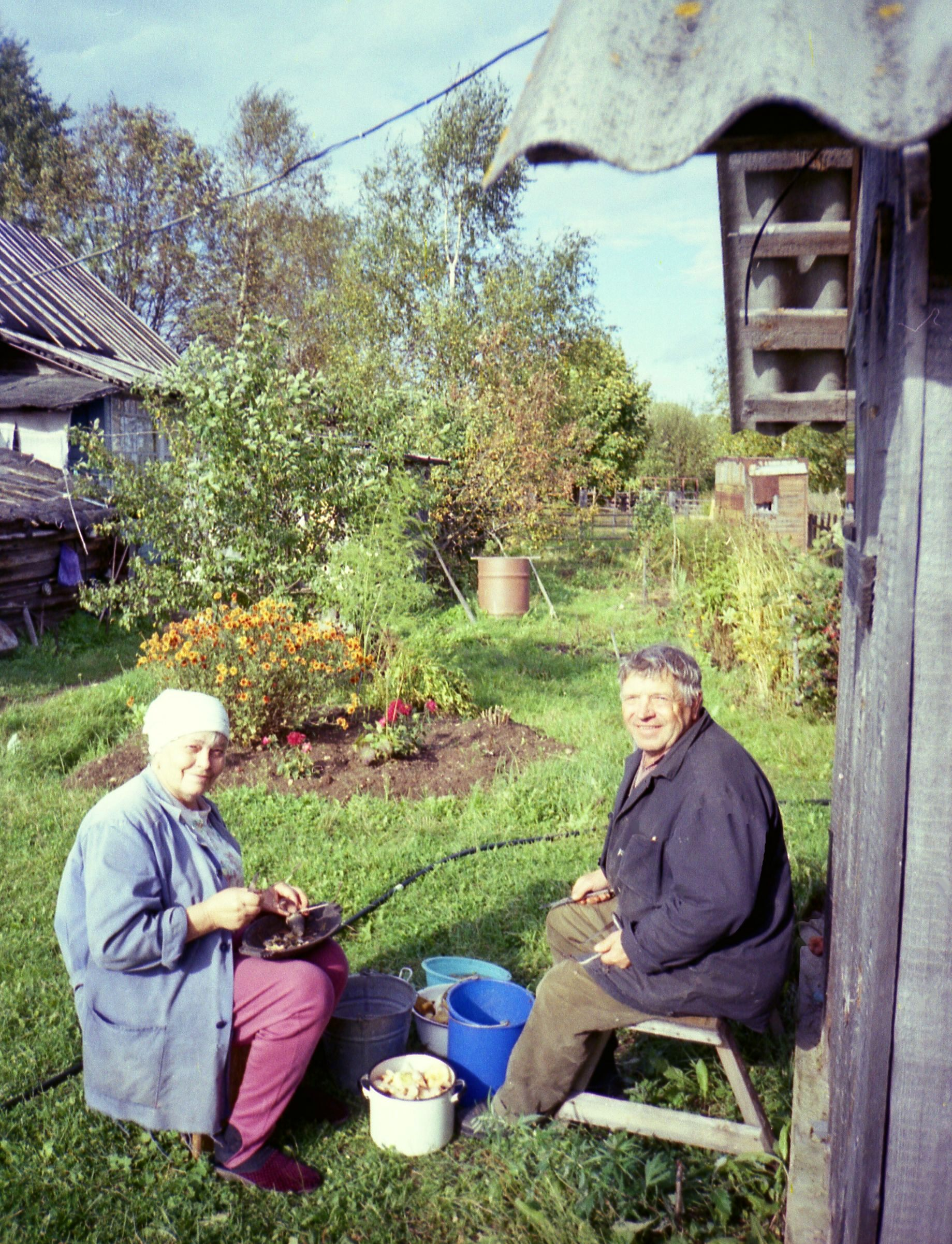 Алексеев Виктор Иванович и Алексеева Александра Павловна